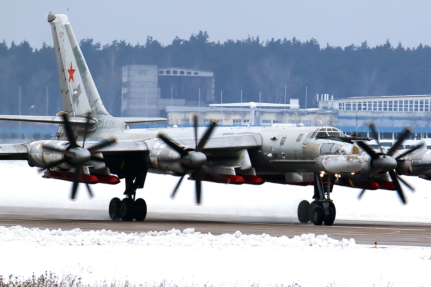 Tu95MSM "Super Modern"